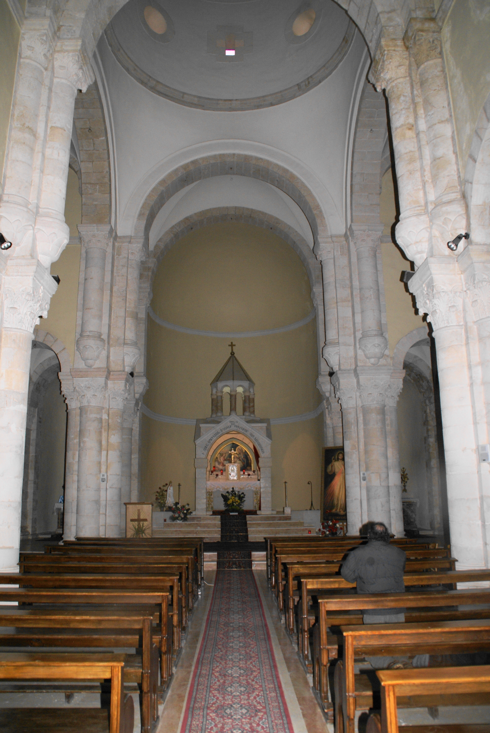 Kirche der Schmerzen Maria an der Via Dolorosa (Station4)